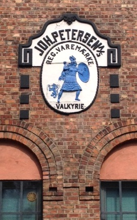 Varemerke, Valkyrie, merke på fasaden av Joh. Petersen AS gamle fabrikkbygning på Bryn, Oslo